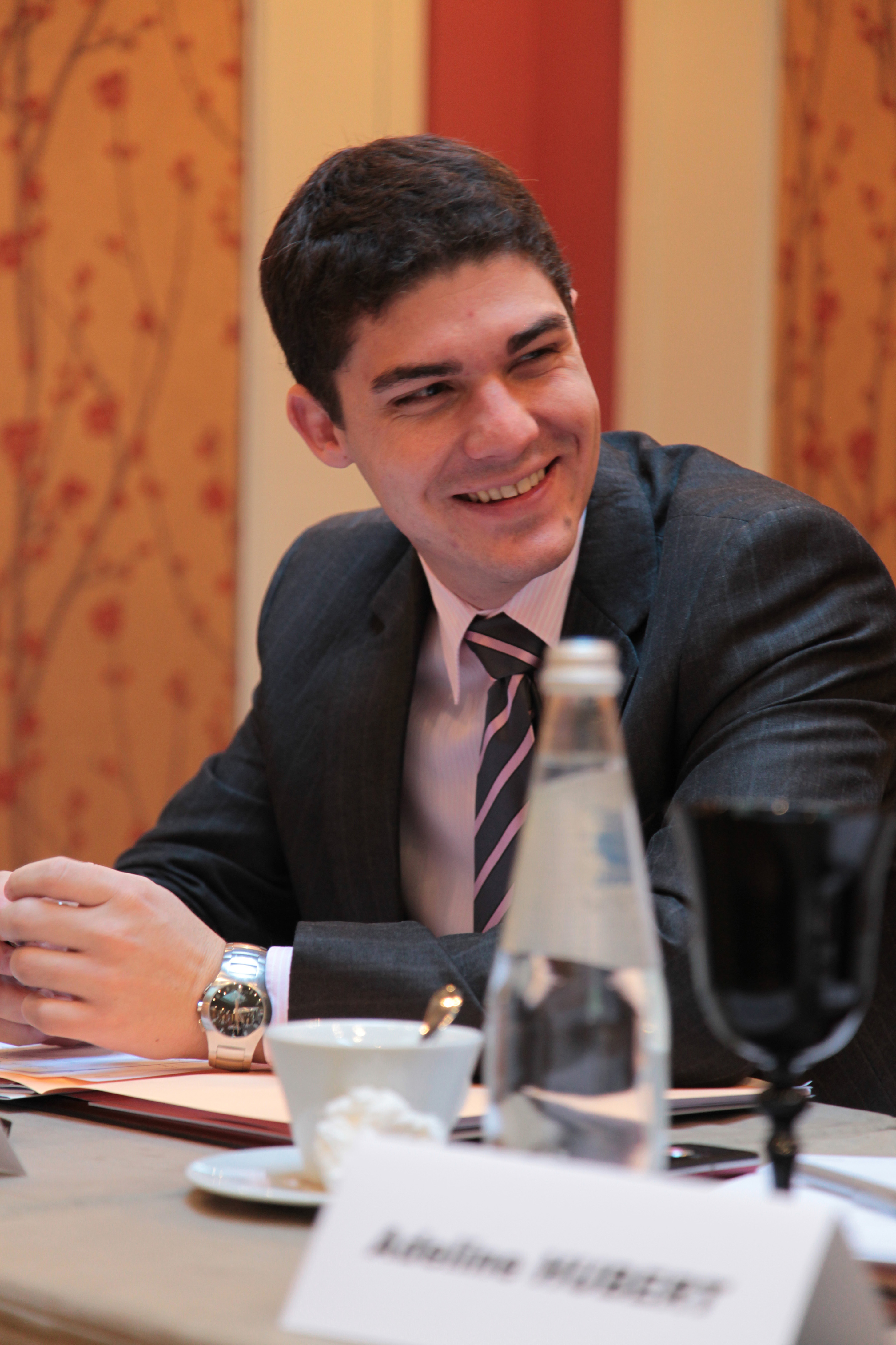 L'école de la Cité (première session 2009)